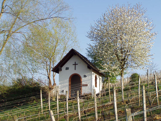 Willborn in Hattenheim am Rhein